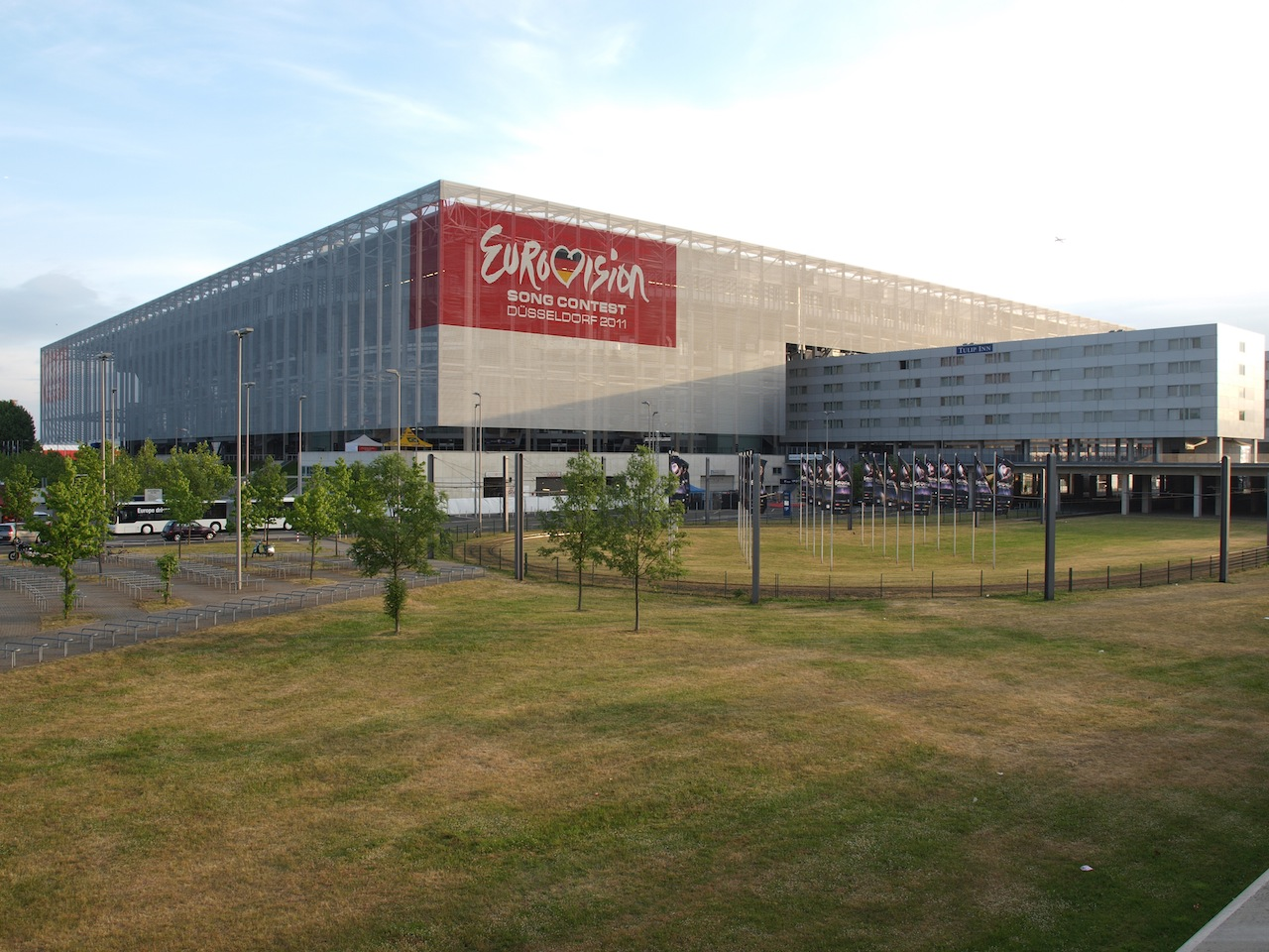 Arena with logo for EUROVISION